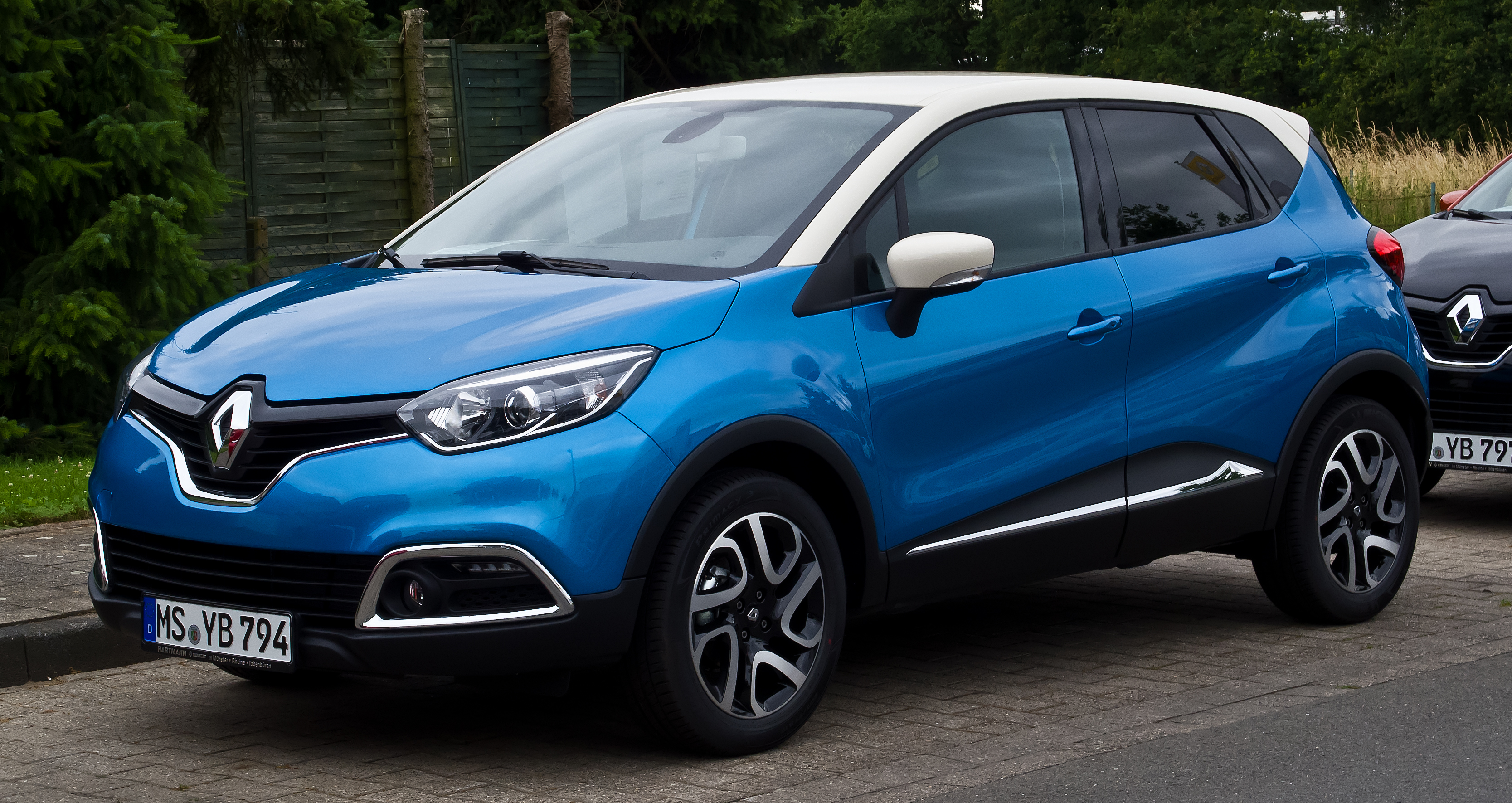 Renault Captur Luxe ENERGY TCe 90 Start & Stop eco²